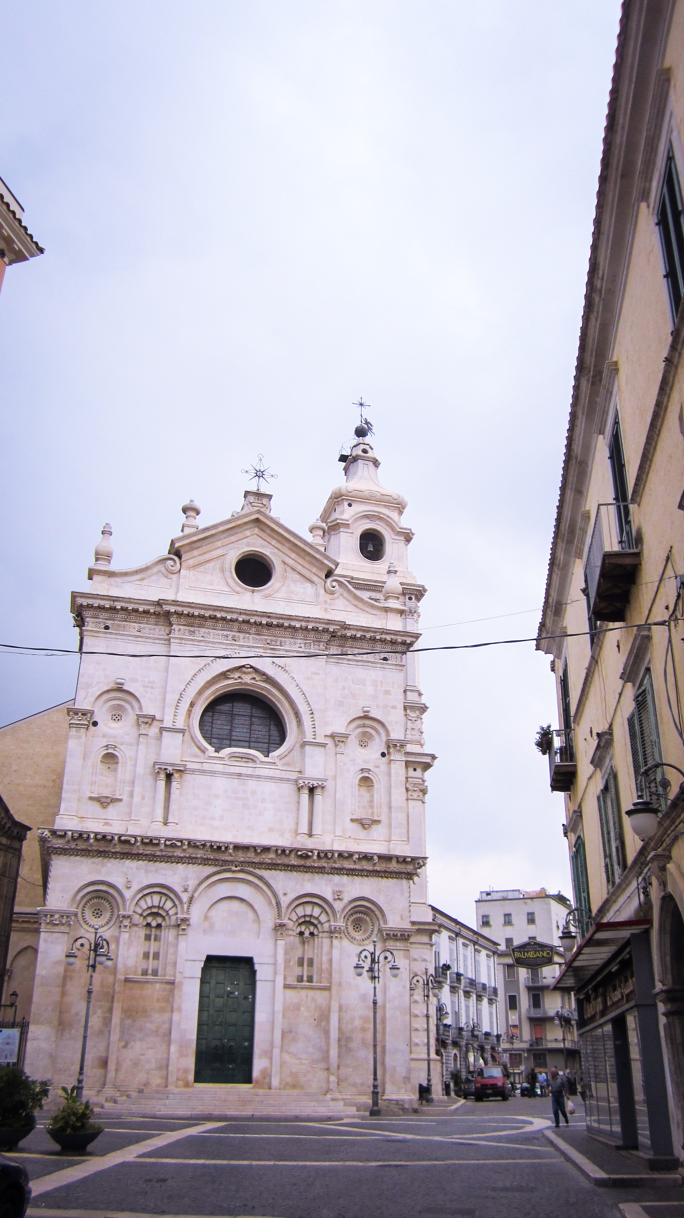 Cattedrale di Fg